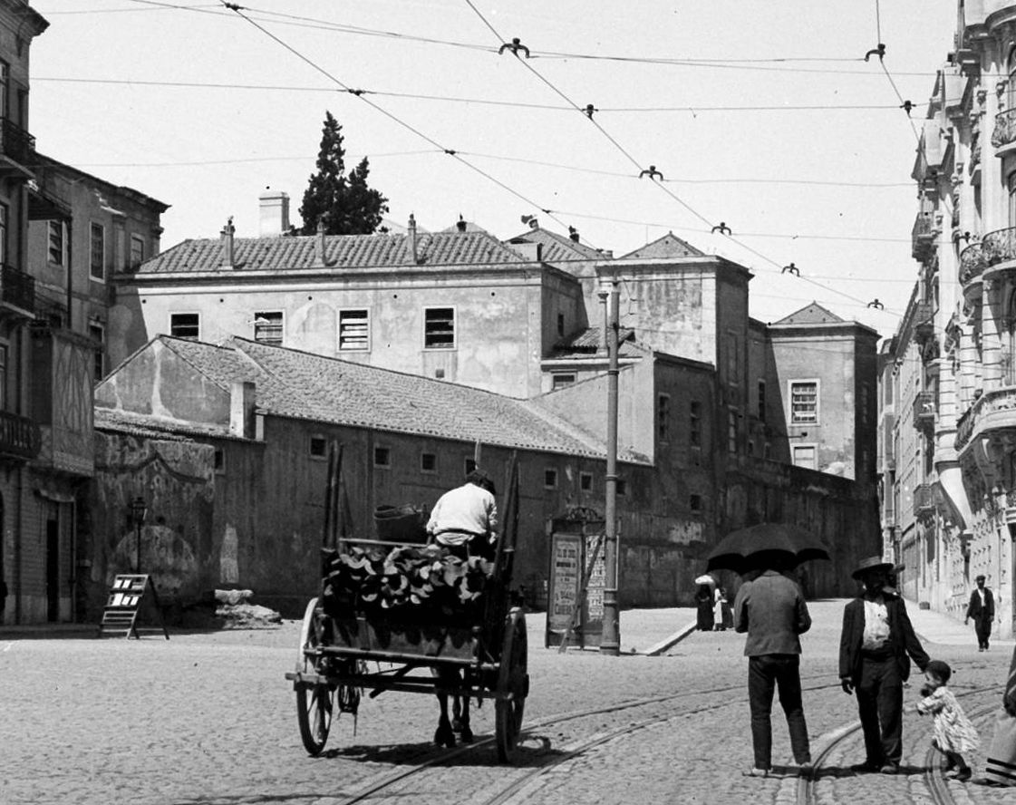 Avenida Almirante Reis. Negativo de gelatina e prata em vidro; 9×12 cm2